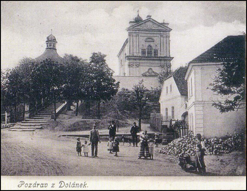 Kostel sv. Jiljí v Dolánkách n. Ohří, 1906